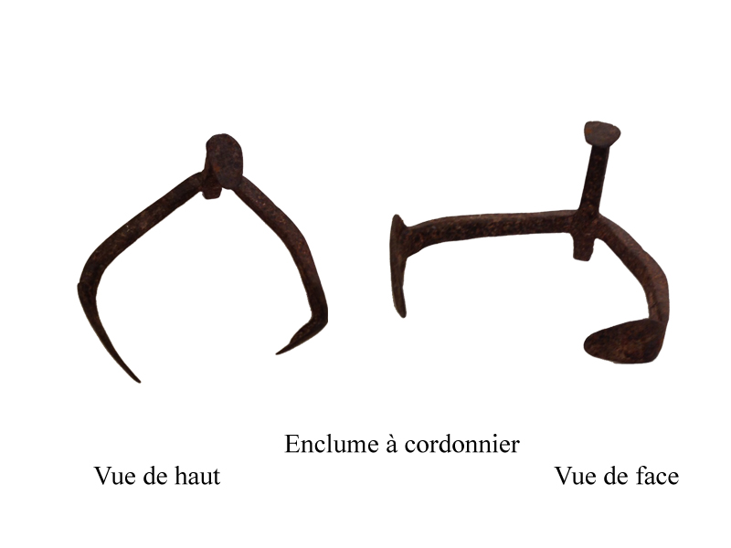 Photographie d'une enclume à cordonnier prise au National Museum Soares dos Reis